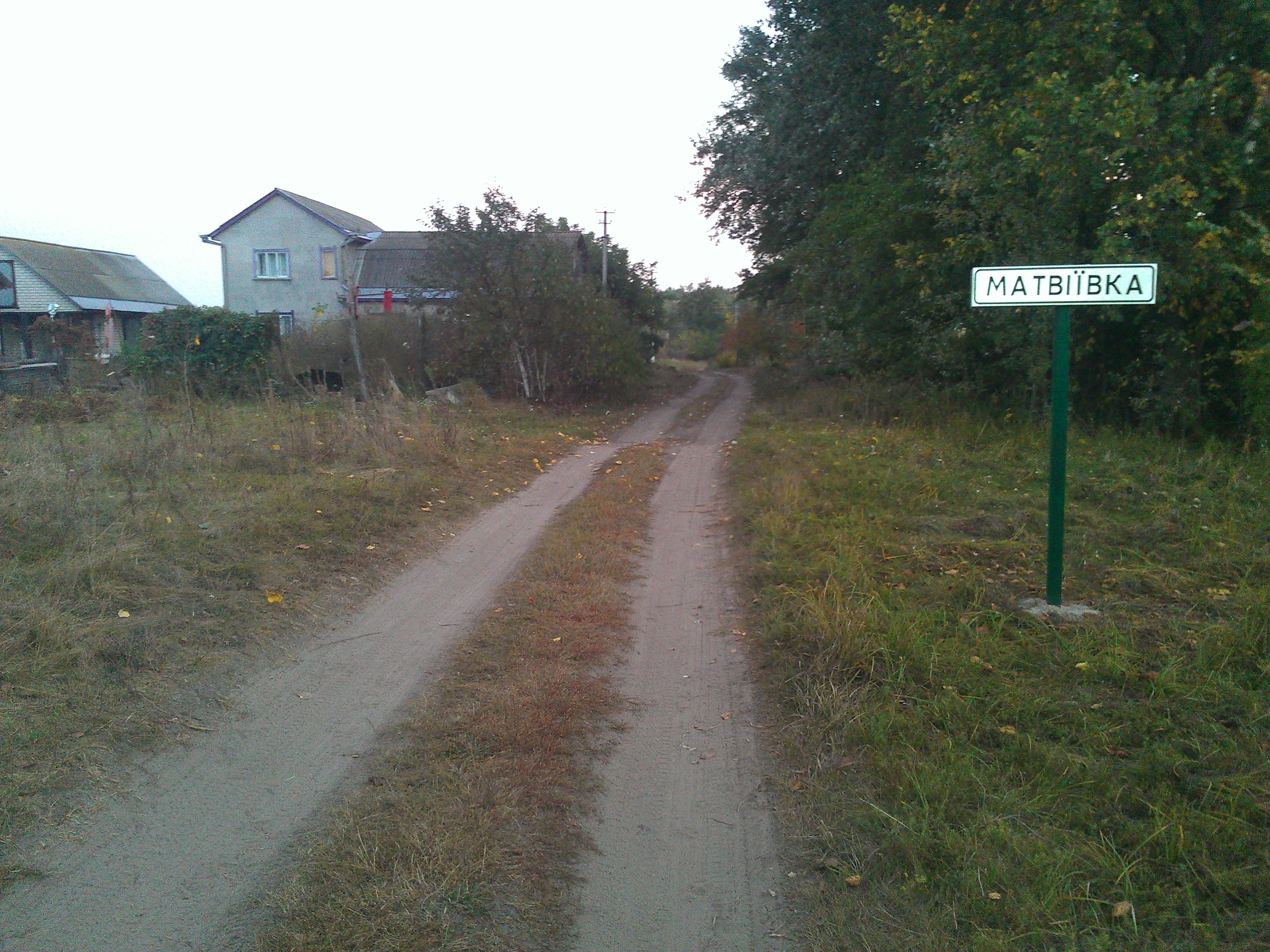 В'їзд до Матвіївки